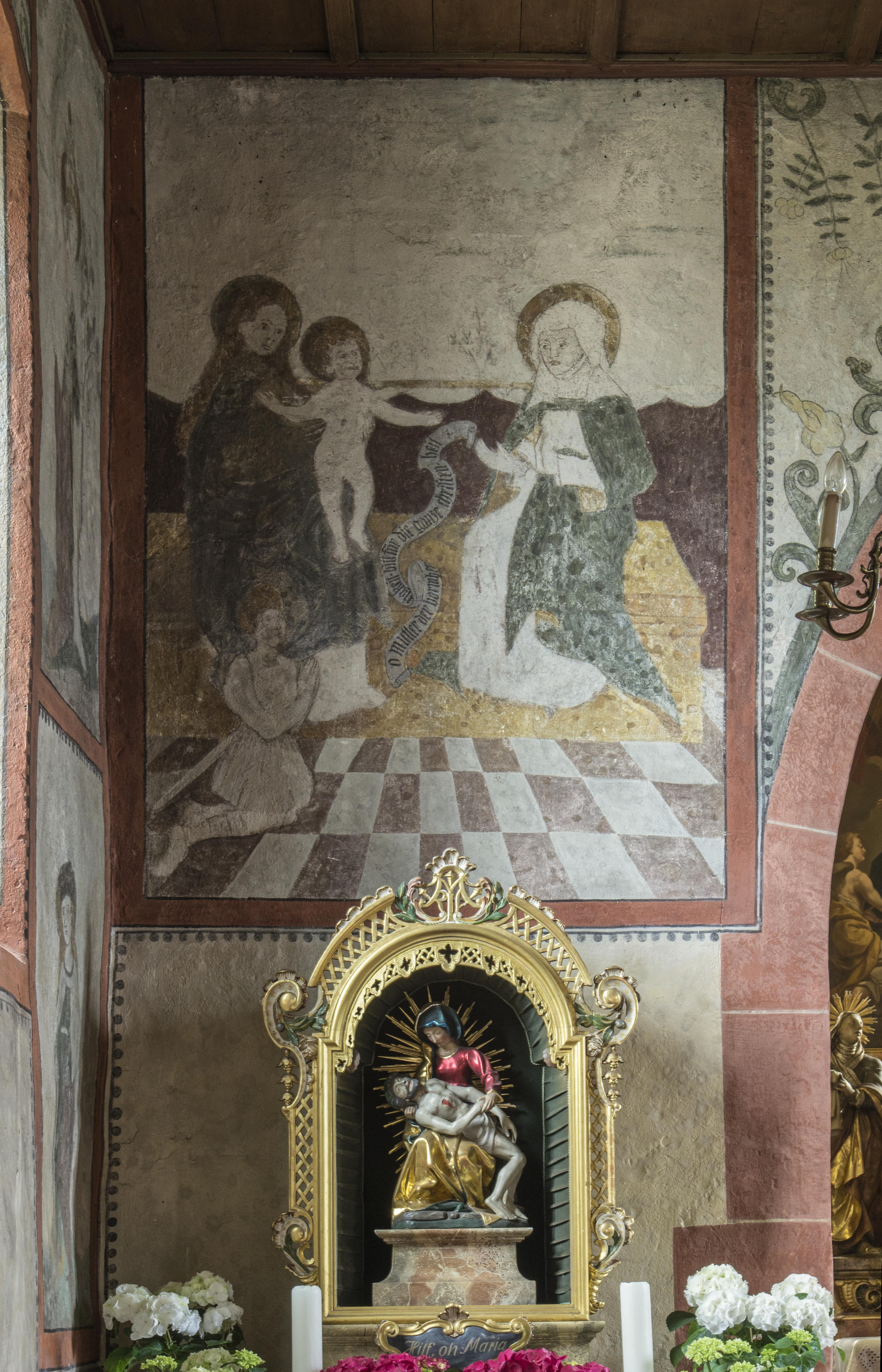 Bilder von der Bühlwegkapelle in Ortenberg